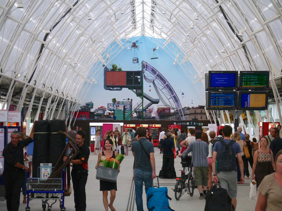 Oeuvre éphémère réalisée pour la gare Montpellier Saint-Roch en 2013 pour les "30 ans des FRAC" Commanditaire : Gare & Connexions/SNCF